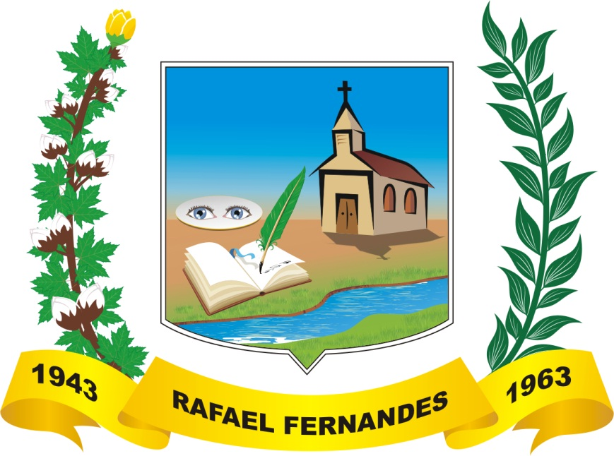 Bandeira de Rafael Fernandes-RN, Brasil